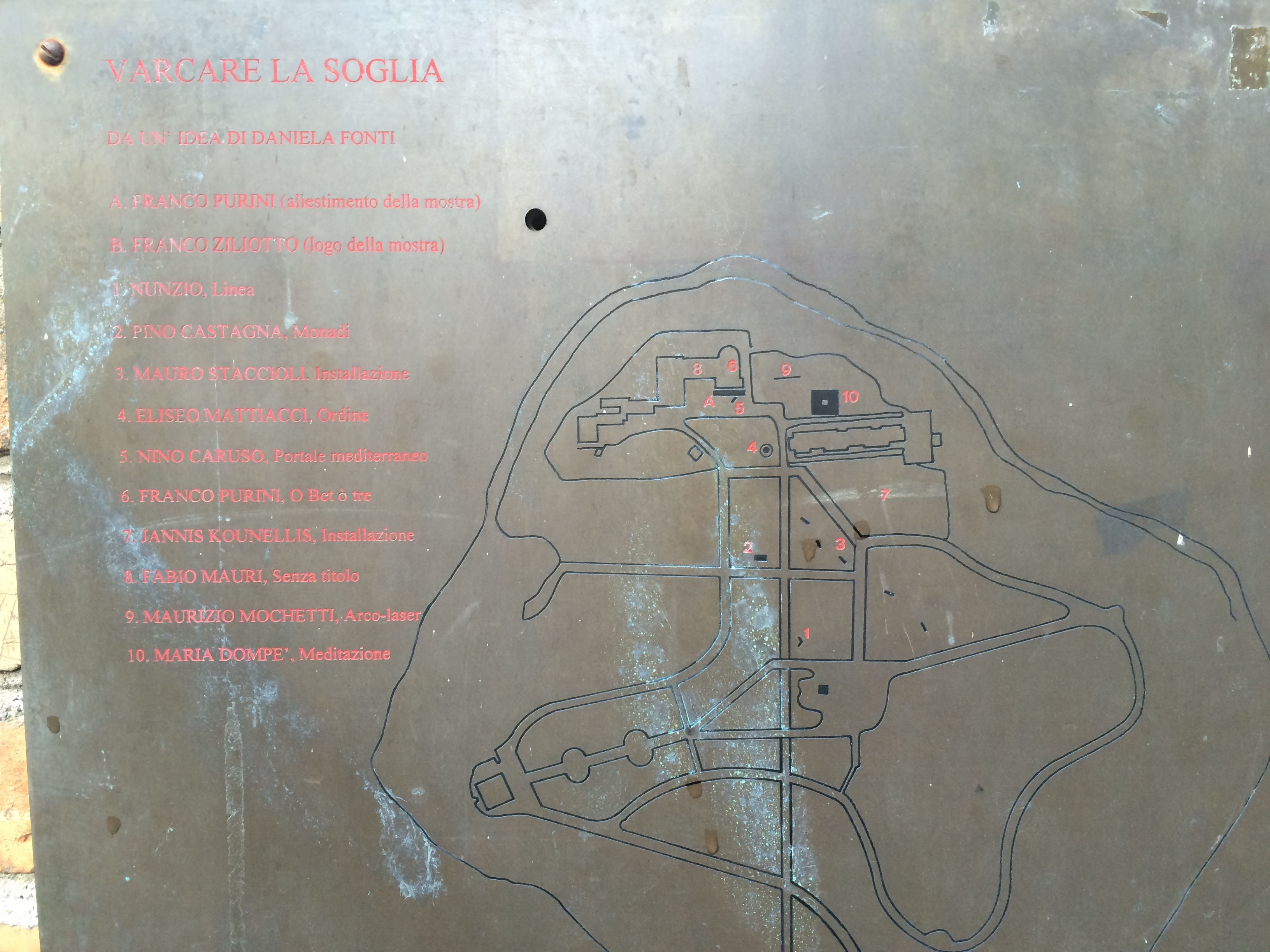 Cartello del percorso di scultura contemporanea di Villa Glori, ideato da Daniela Fonti